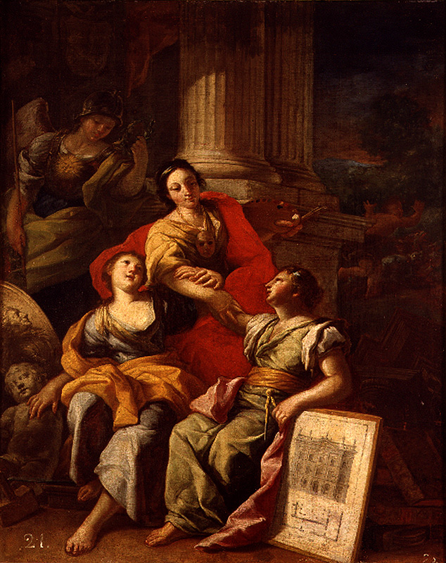 La obra es una alegoría de las tres nobles artes: la pintura, la arquitectura y la escultura.